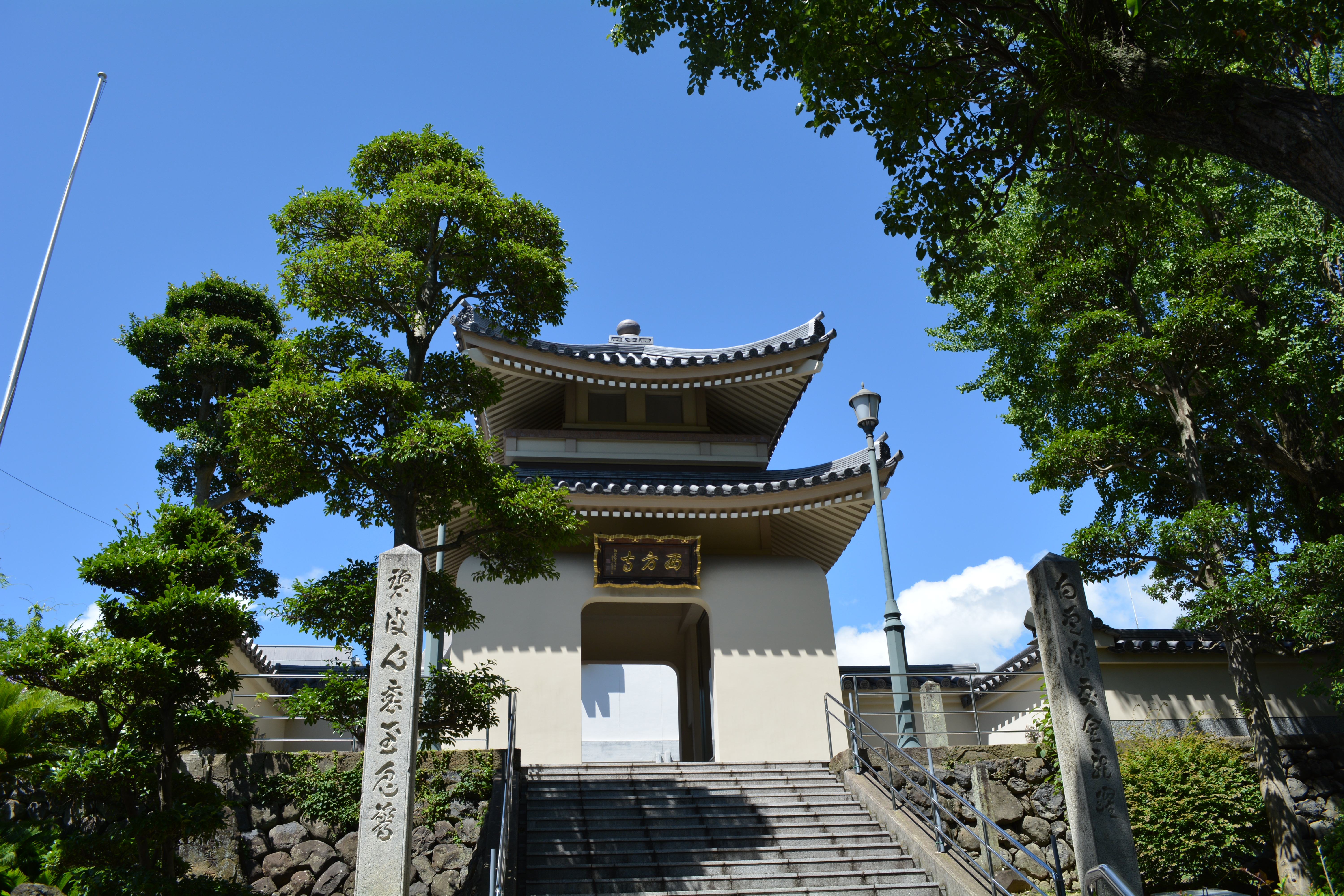 長崎県佐世保市にある西方寺の山門です。